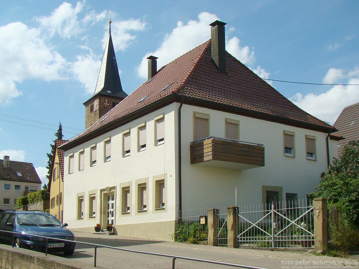 Pfarrhaus bei der evang. Kirche in Heilbronn-Frankenbach